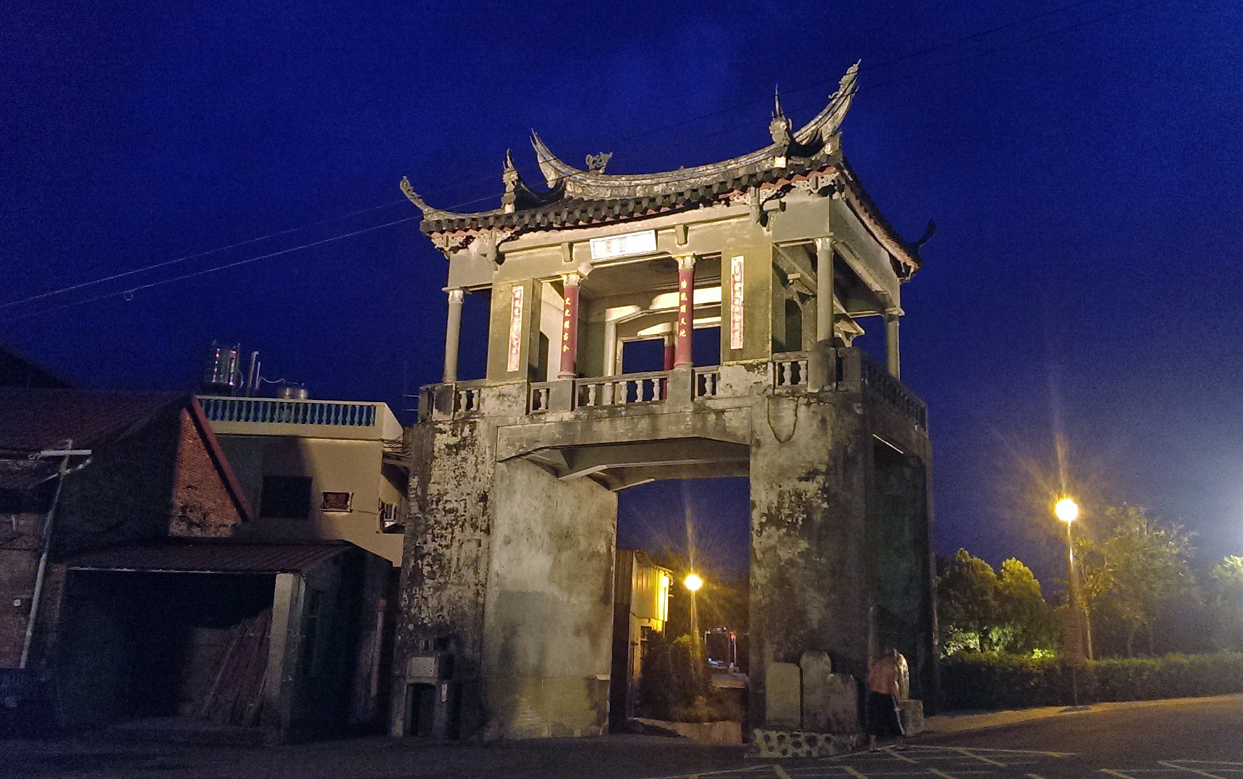 中文（台灣）: 瀰濃東門樓夜景